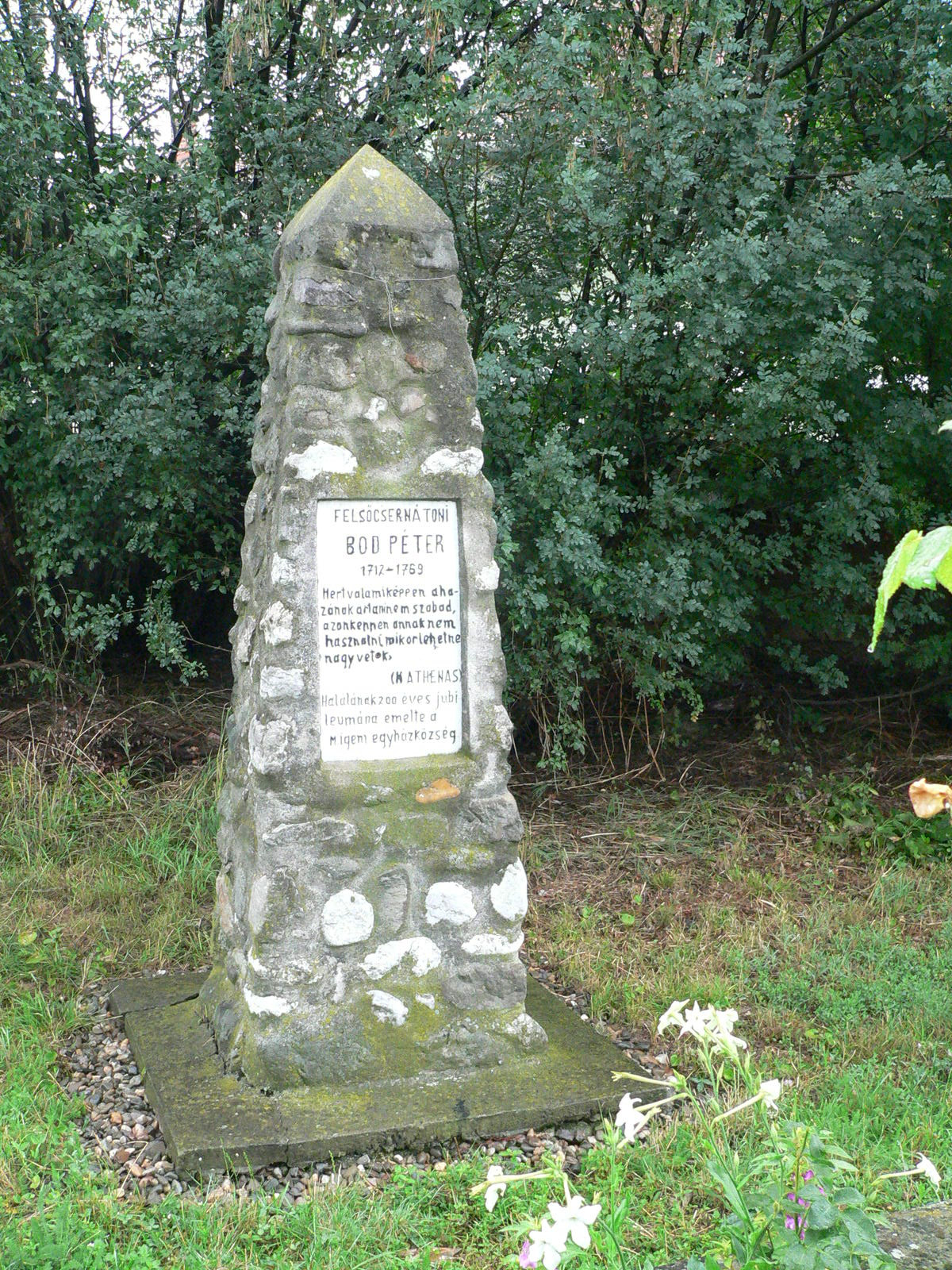 Bod Péter síremléke, Magyarigen